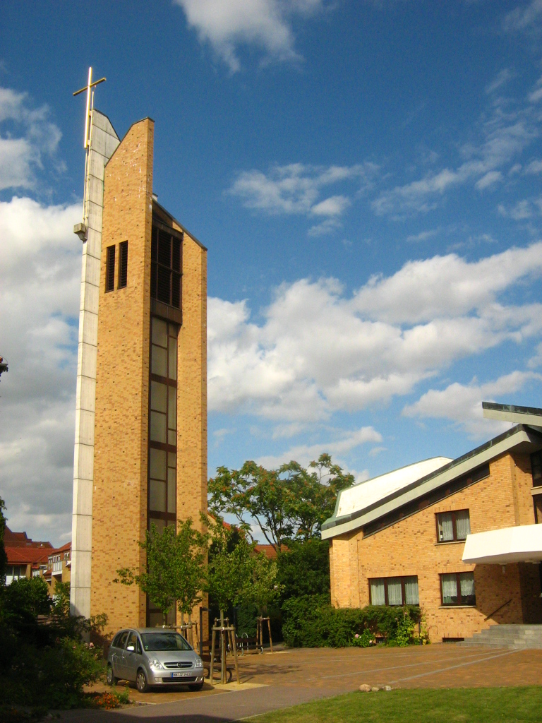 Die Kirche der katholischen Pfarrgemeinde St. Josef - St. Lukas in Neubrandenburg, 1980 geweiht.